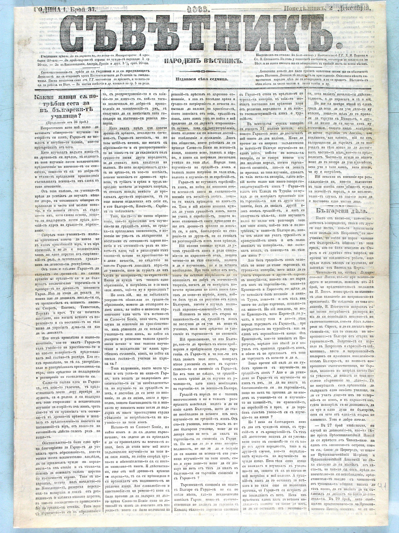 Челната страница на брой 37 на вестник Съветник, 1863 година